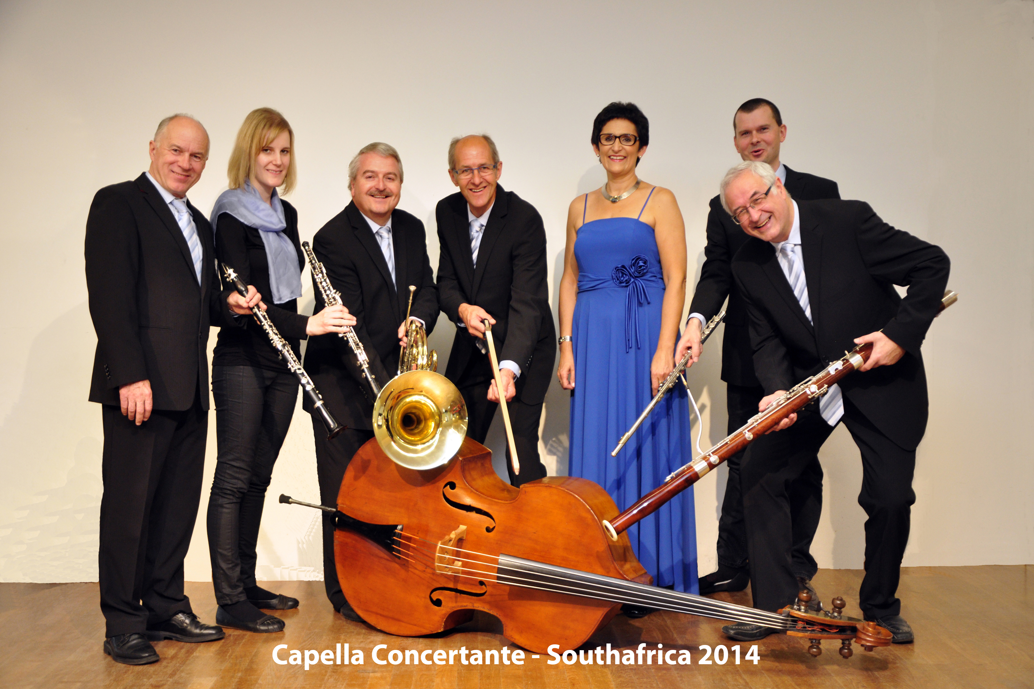 Capella Concertante Besetzung Tournee 2014